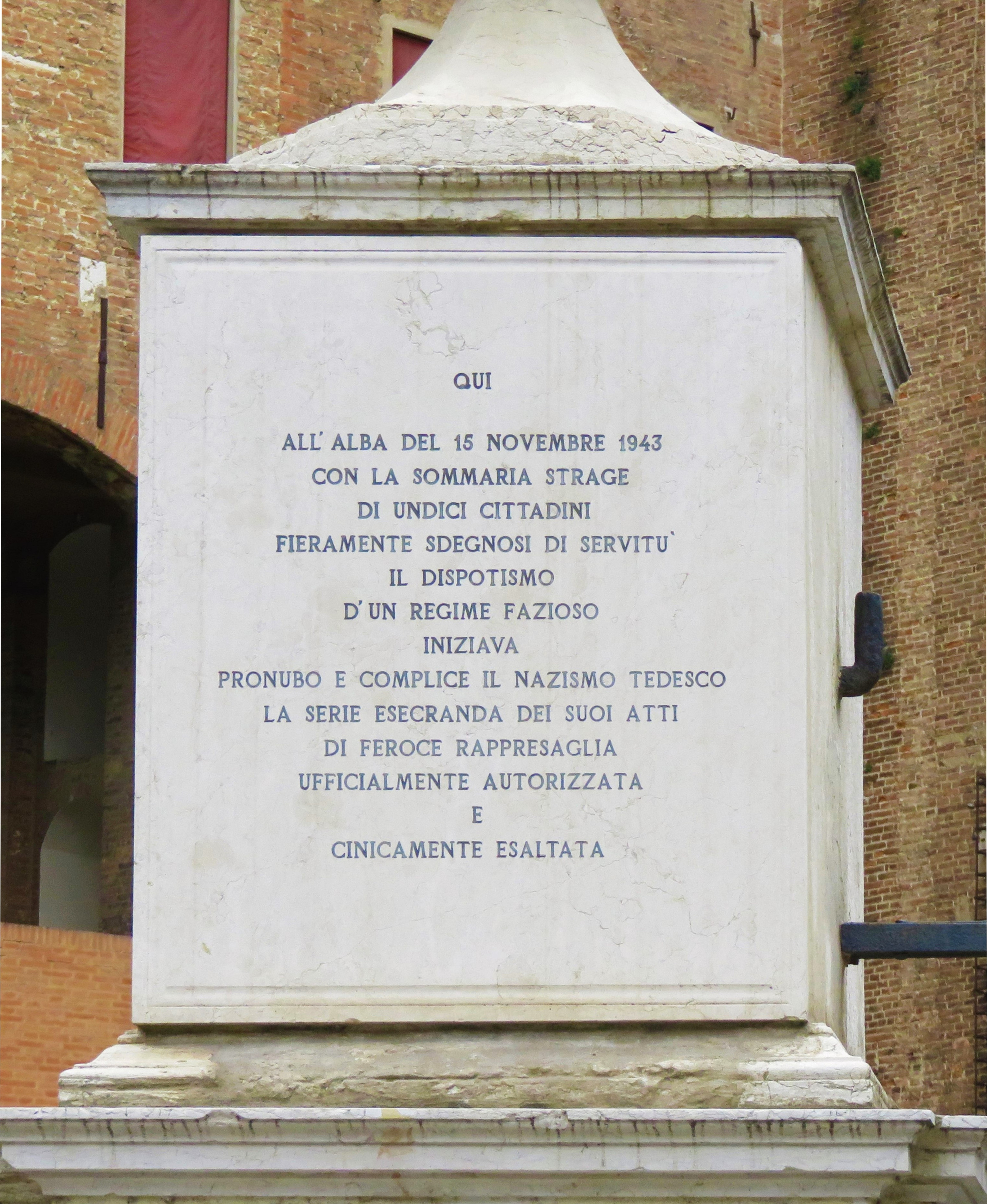 Prima epigrafe sul pilastro di sinistra che regge il cancello di accesso alla fossa del Castello Estense. Testo: QUI ALL'ALBA DEL 15 NOVEMBRE 1943 CON LA SOMMARIA STRAGE DI UNDICI CITTADINI FIERAMENTE SDEGNOSI DI SERVITU' IL DISPOTISMO D'UN REGIME FAZIOSO INIZIAVA PRONUBO E COMPLICE IL NAZISMO TEDESCO LA SERIE ESECRANDA DEI SUOI ATTI DI FEROCE RAPPRESAGLIA UFFICIALMENTE AUTORIZZATA E CINICAMENTE ESALTATA